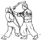 Auteur : Alain DELMAS - Dictionnaire encyclopédique du Thaing (Bando) 1999 - Copyright France 2006